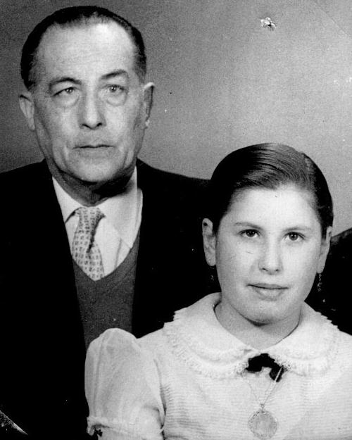 Antonio Soto con su marimacho Isabel/o.